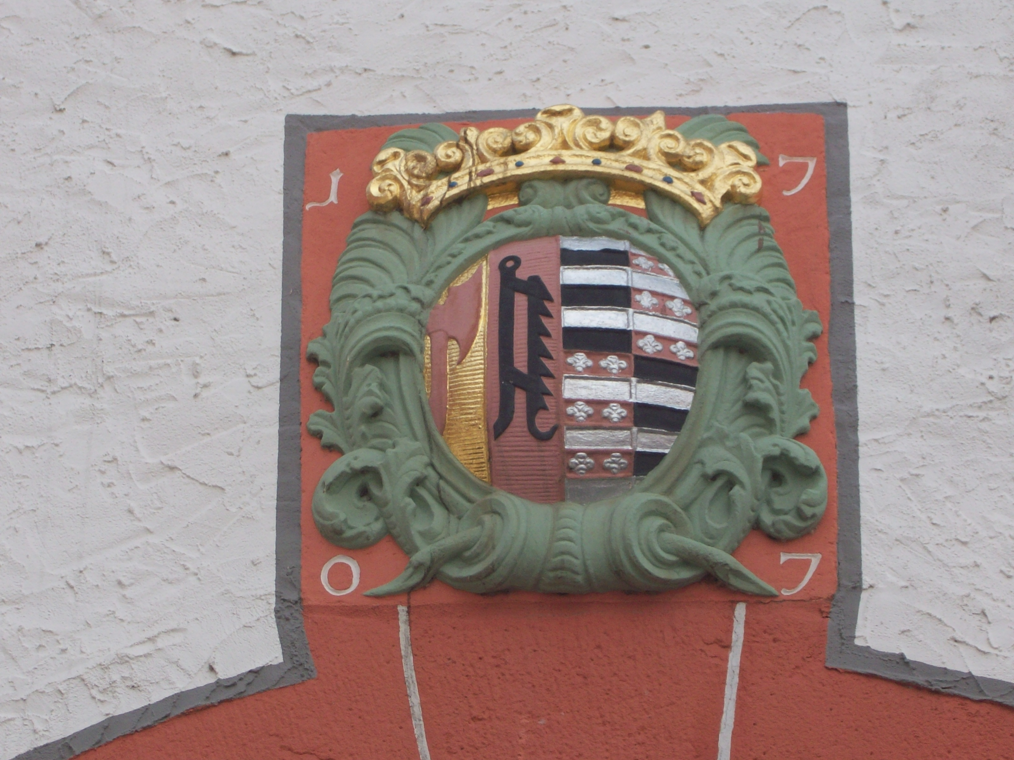 Wappen am Torhaus des Schleifrashofes